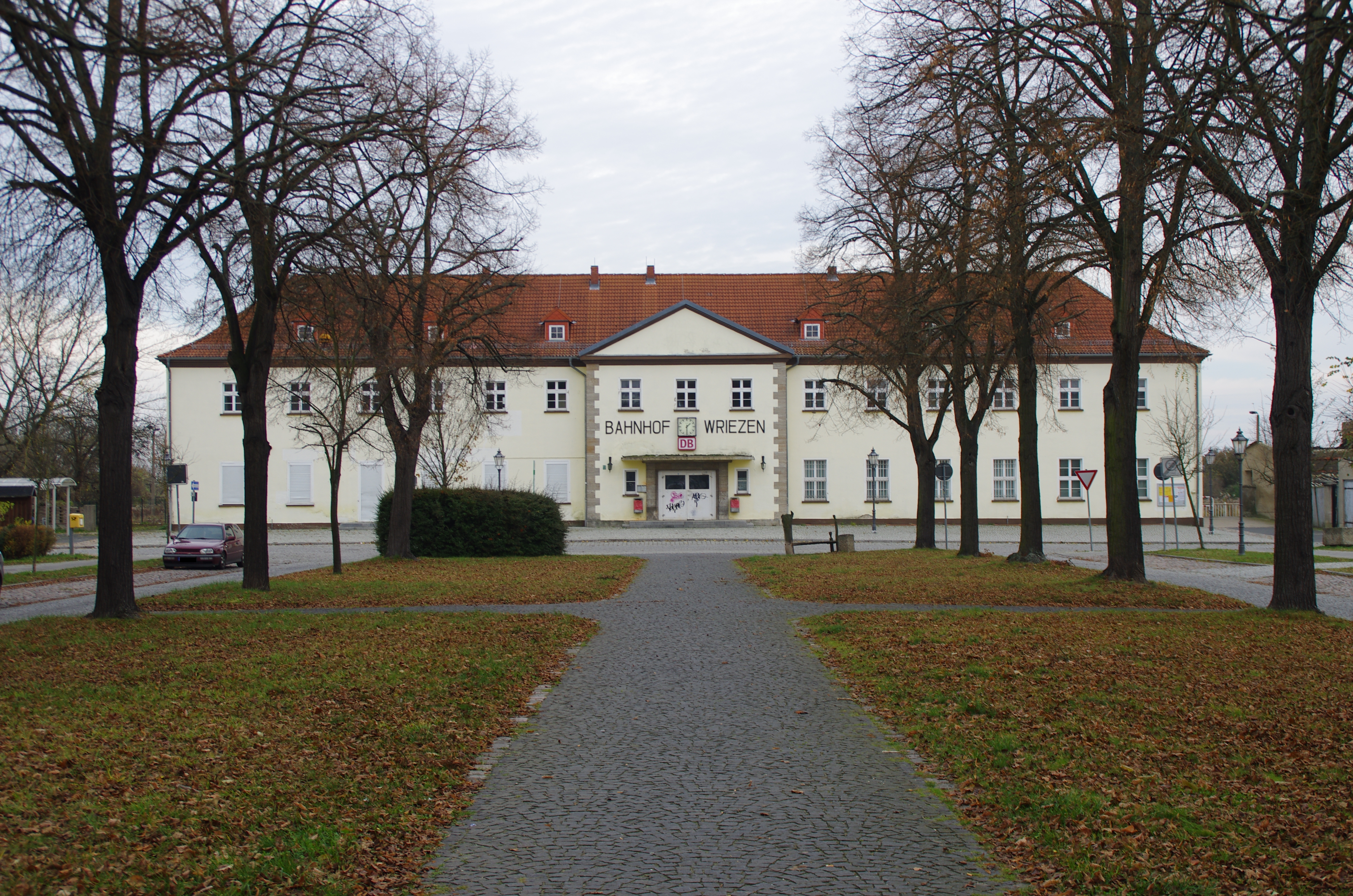 Wriezen in Brandenburg. Der Bahnhof in Wriezen steht unter Denkmalschutz.